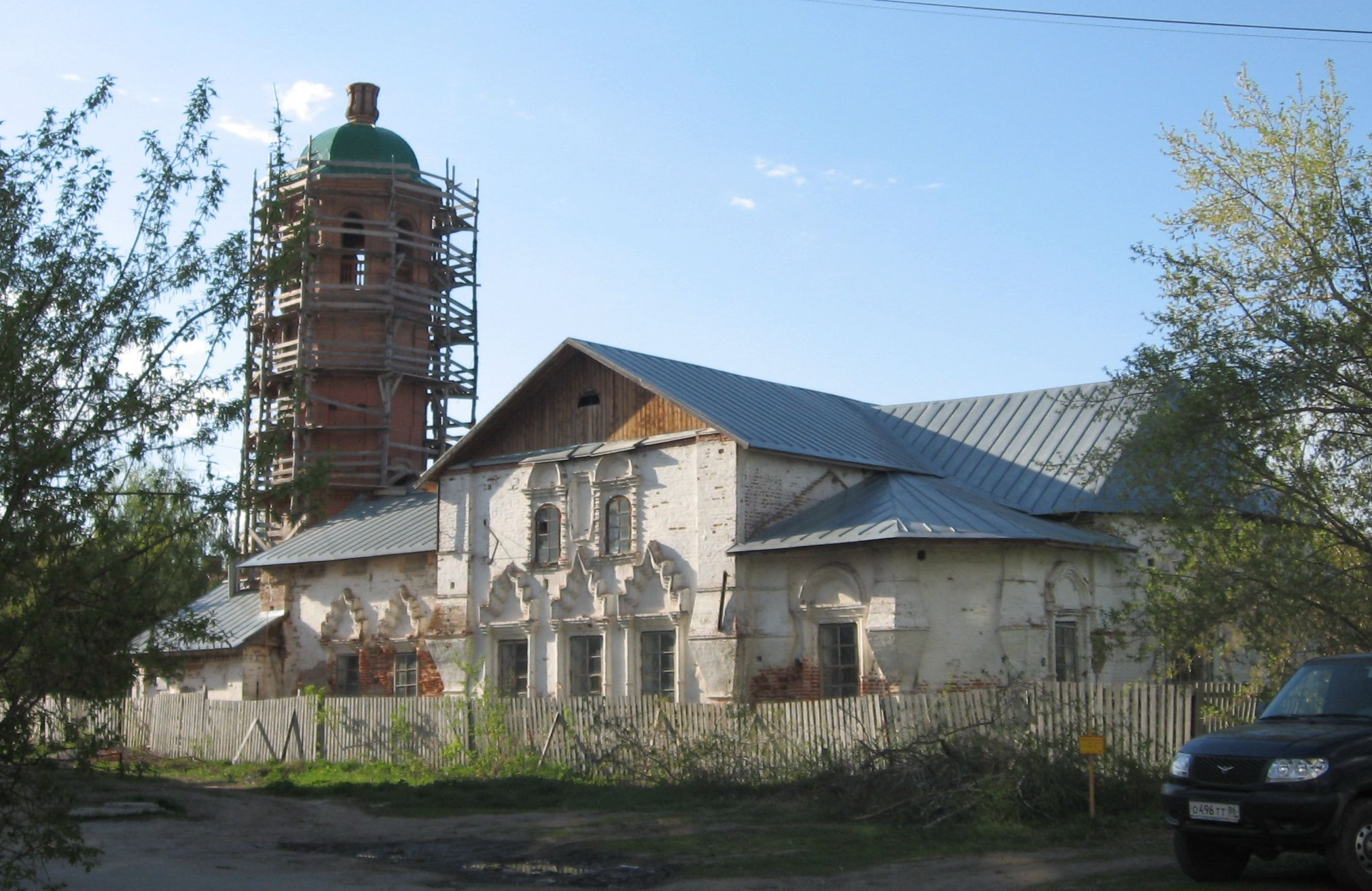 Спасская церковь в Тобольске